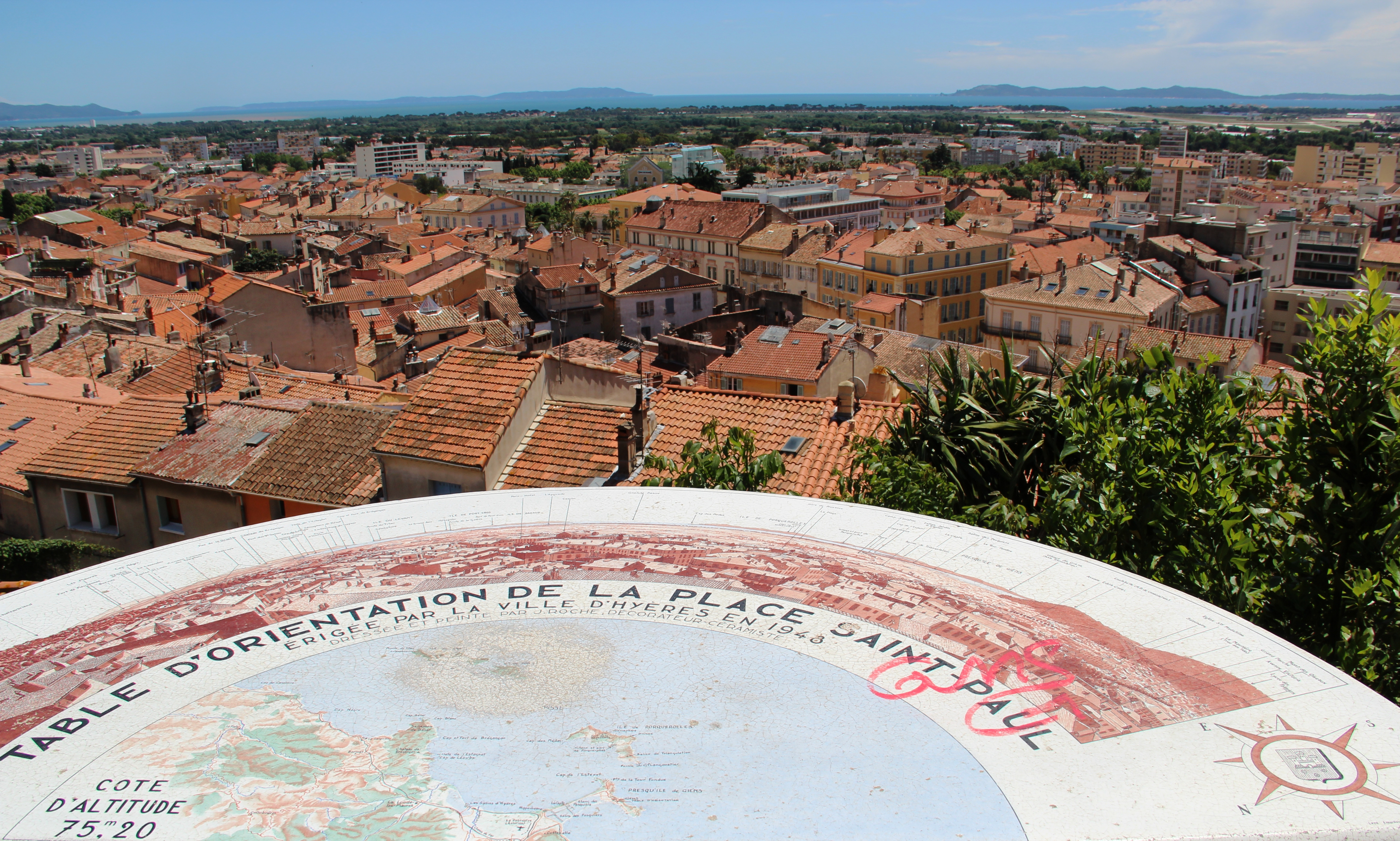 La Tour des Templiers - Hyeres